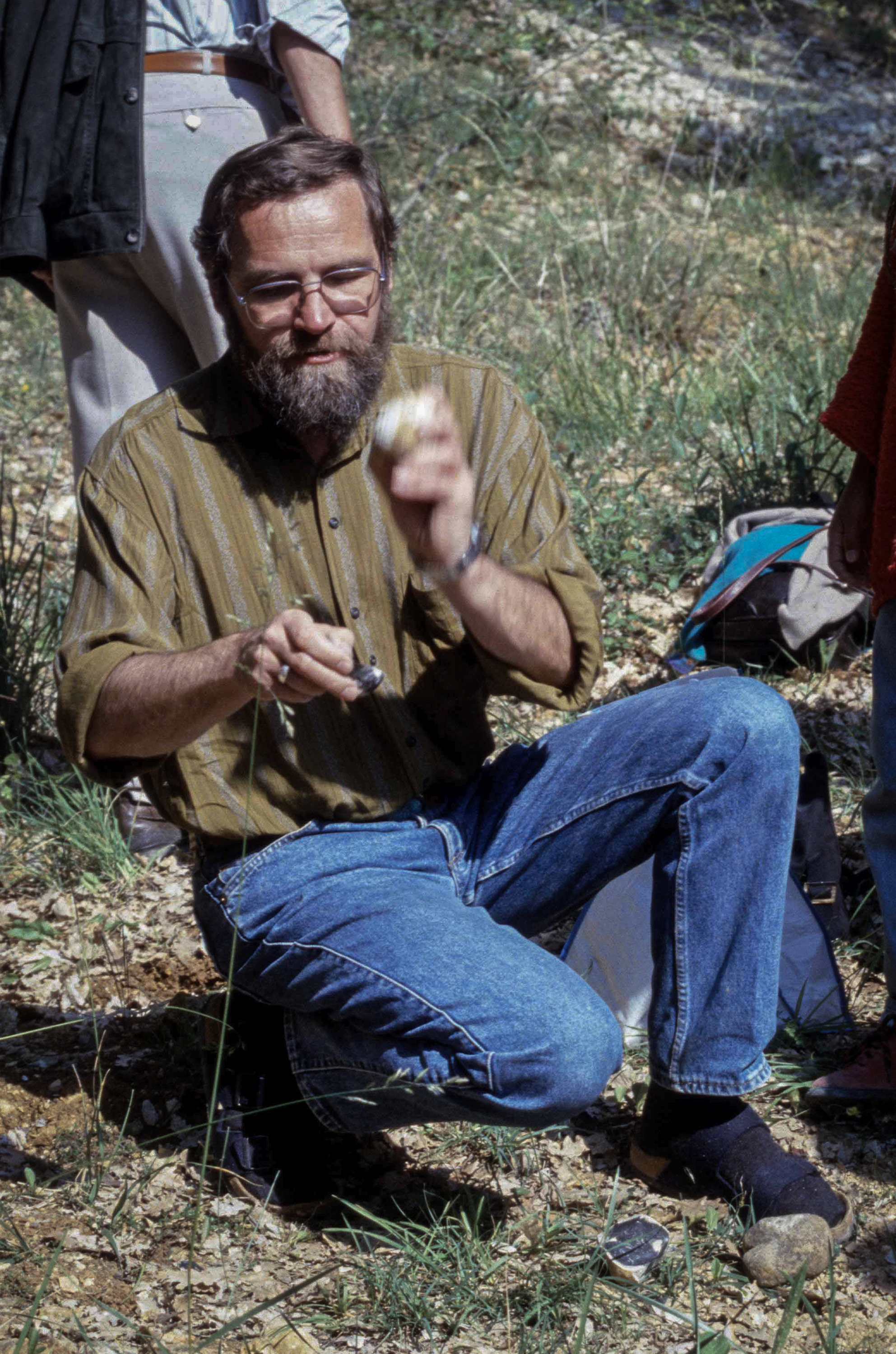 Der deutsche Prähistoriker Joachim Hahn (1942–1997) an der Höhle von Rouffignac, bei einer Exkursion der GfU - Gesellschaft für Urgeschichte und Förderverein des Urgeschichtlichen Museums Blaubeuren e.V.